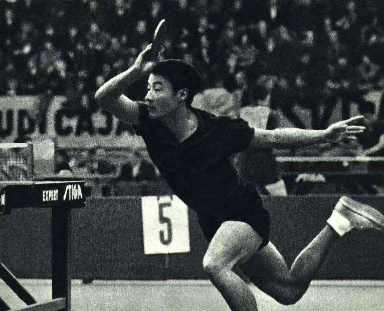 1965-7 1965年 28届世界锦标赛 李富荣